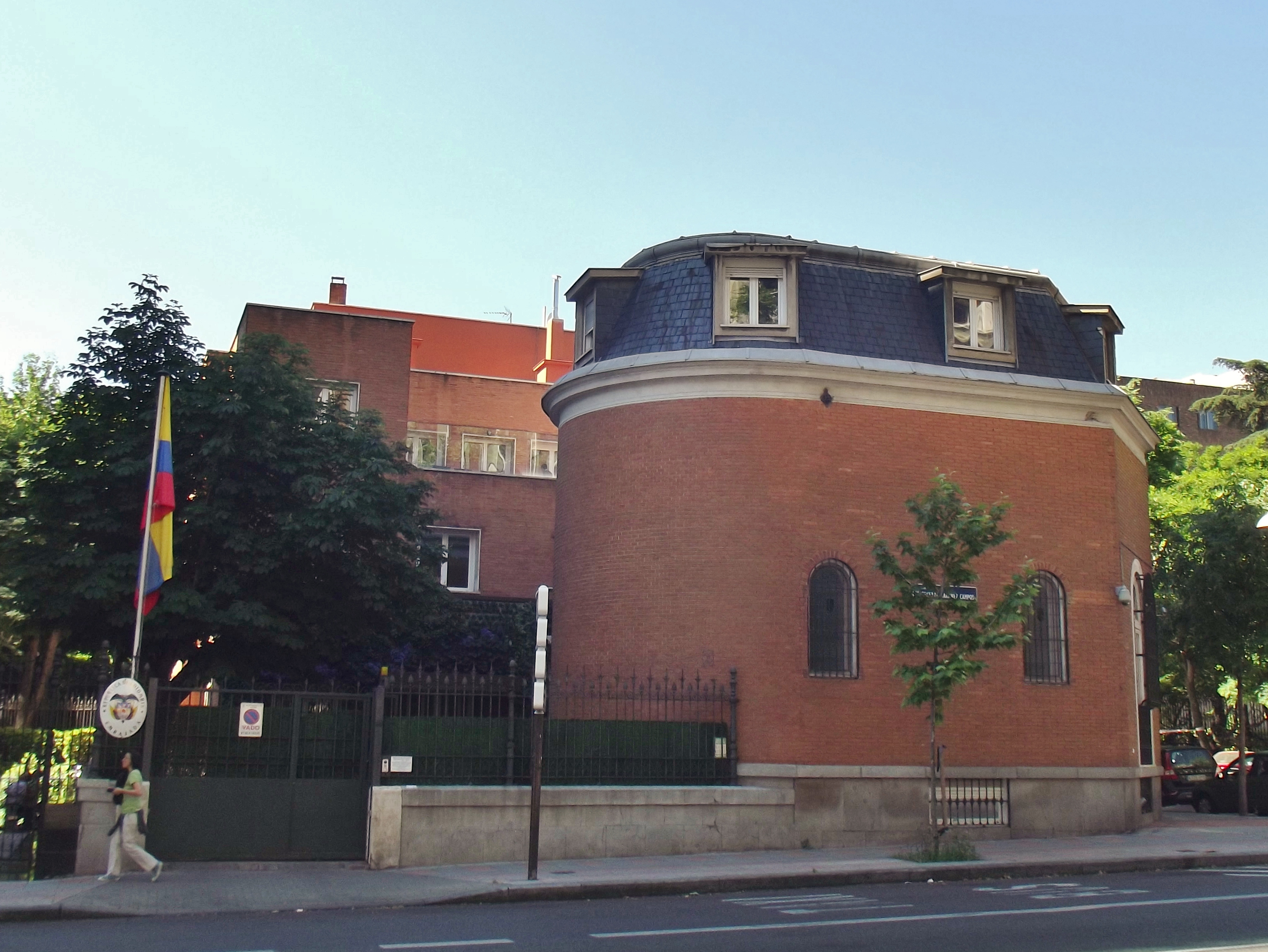 Embajada de Colombia, Paseo del General Martínez Campos, 48, 28010 Madrid